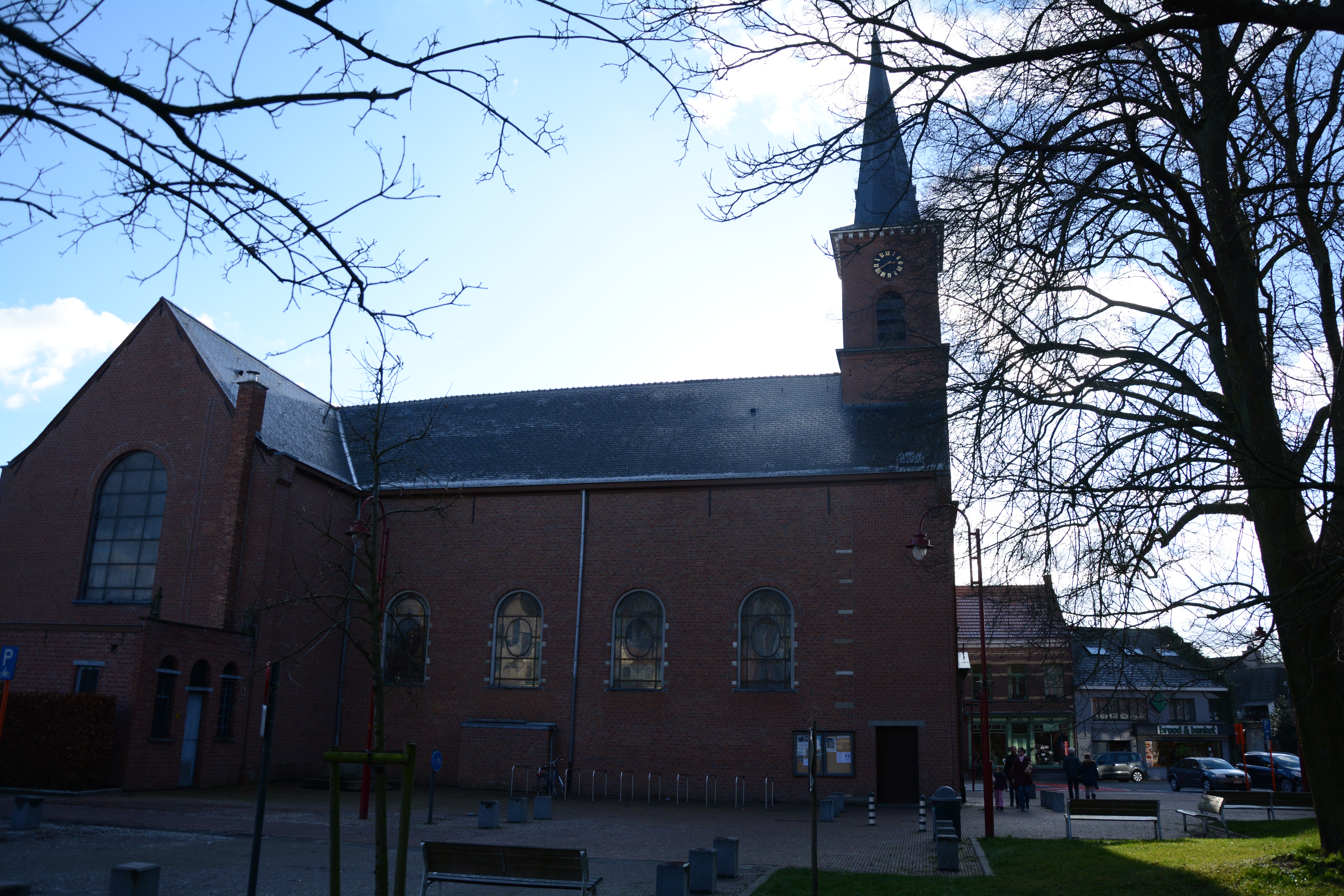 Parochiekerk Onze-Lieve-Vrouw Geboorte, Lint, Antwerpen